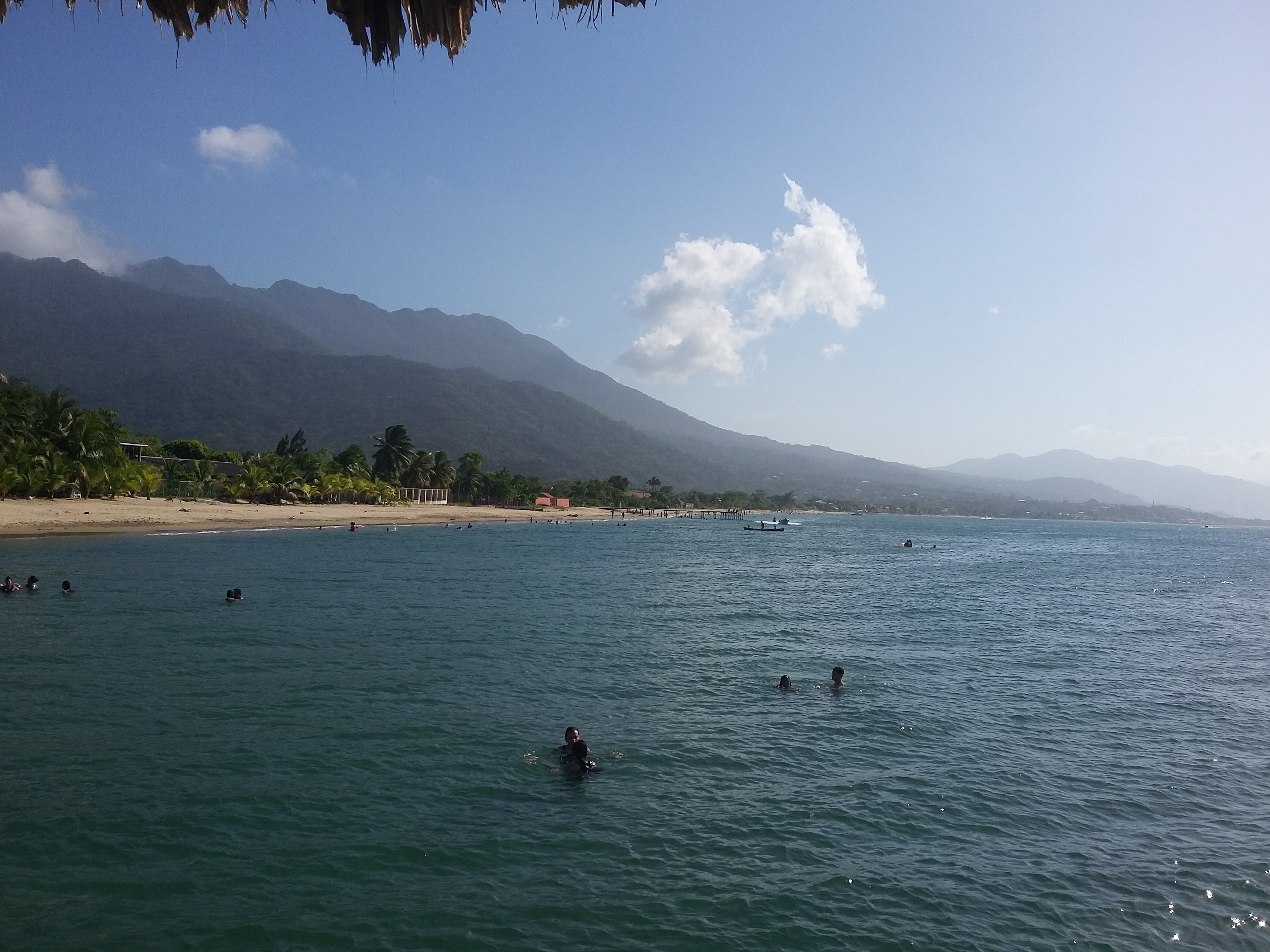 Vista de la Playa en Trujillo.